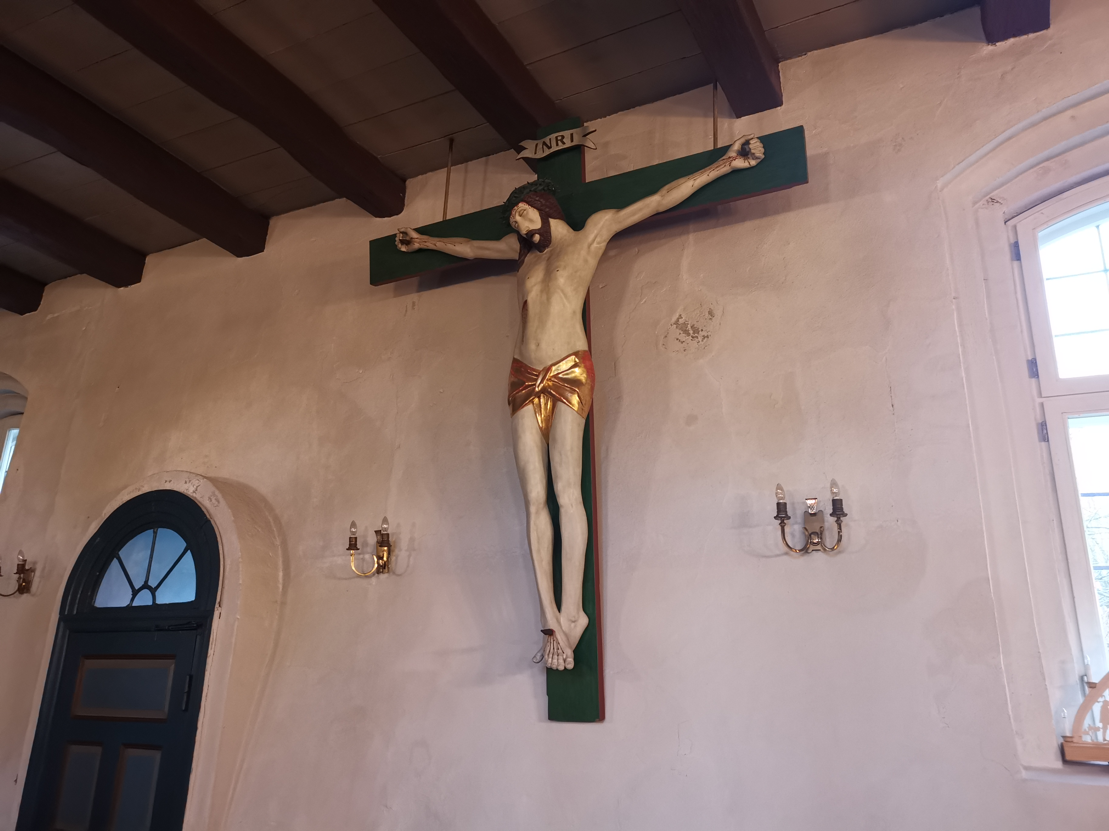 Innenansicht Kirche Süderhastedt